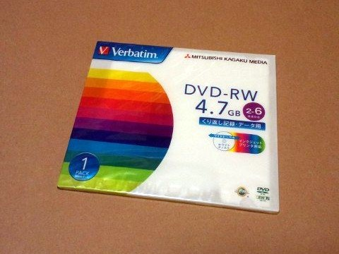 バーベイタム製品 DVD-RW